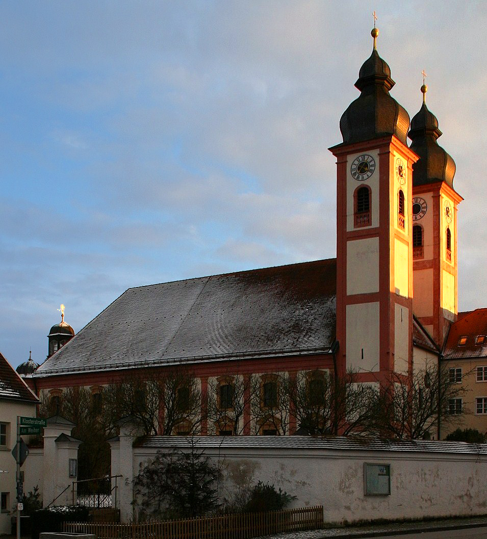 Klosterkirche Au am Inn (Landkreis Mühldorf am Inn, Oberbayern). Nordseite der barocken Doppelturm-Kirche.